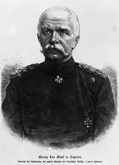 Text auf dem Bild: Georg Leo Graf v. Caprivi, General der Infanterie, der - zweite Kanzler des Deutschen Reichs, gest. am 6. Februar. formale Bemerkung: Repro Portrait of Leo von Caprivi